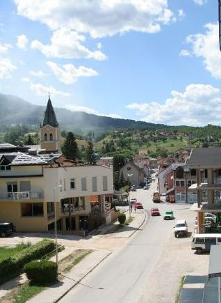 crkva u Busovači